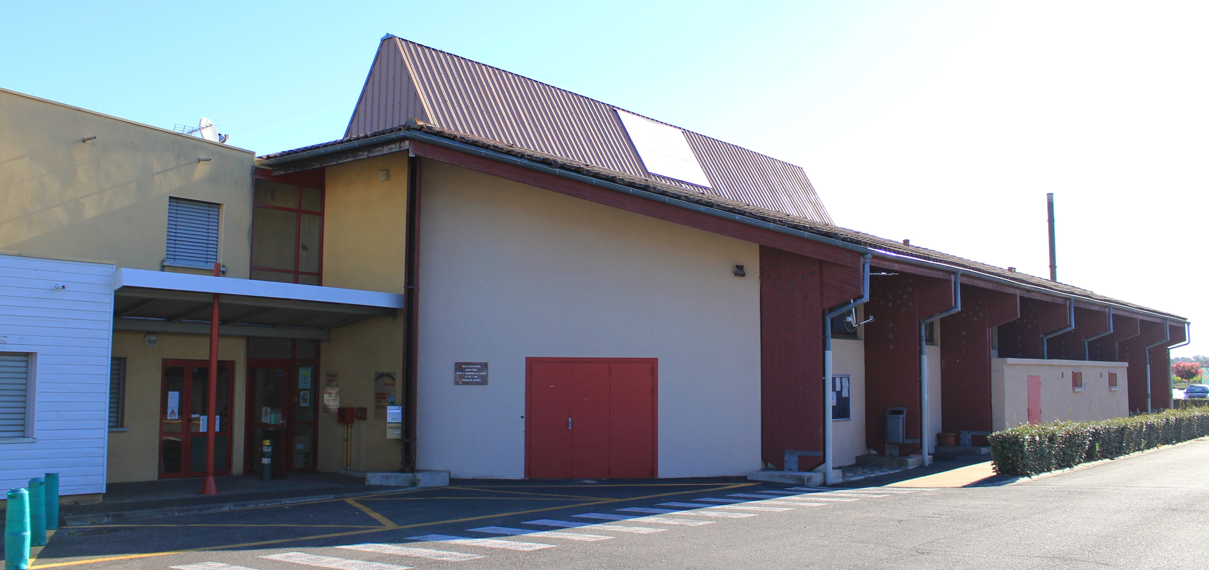 Salle des fêtes de Bordères-sur-l'Échez (Hautes-Pyrénées)